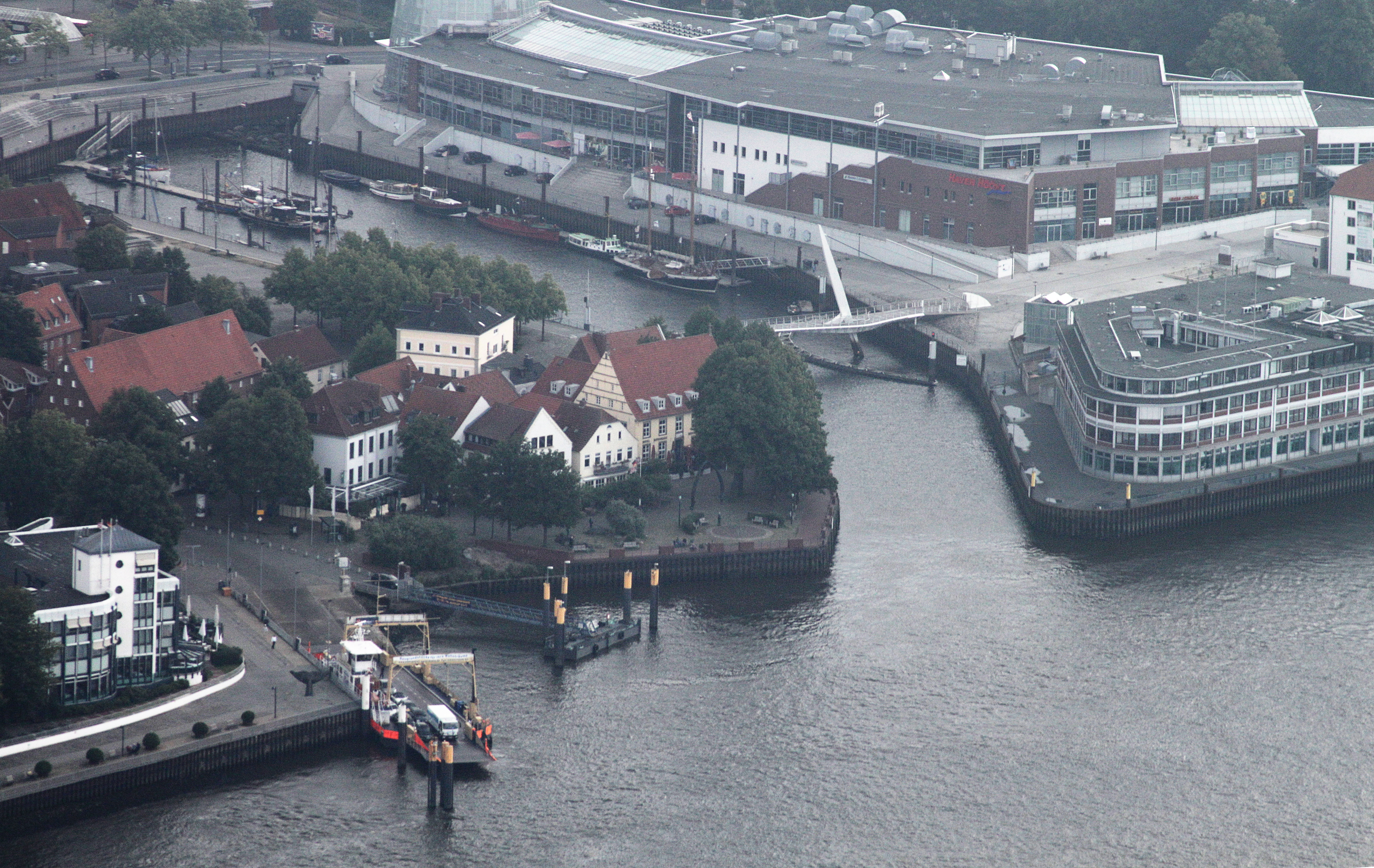 Fotoflug Bremen; Flughöhe 500 m; Luftbilder Bremen-Nord: vom U-Boot Bunker Valentin bis Vegesack ; Flug entlang der Weser von West nach Ost, über dem linken Weserufer, mit Blickrichtung zum rechten Weserufer